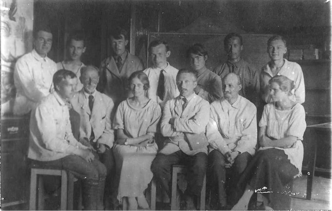 Киев, сотрудники Верхней лаборатории, 20 мая 1923 г. нижний ряд слева направо - проф. Д. Е. Белинг (4-й), проф. И. И. Шмальгаузен (5-й) верхний ряд - крайний справа Балинский, Борис Иванович (Boris Ivan Balinsky )